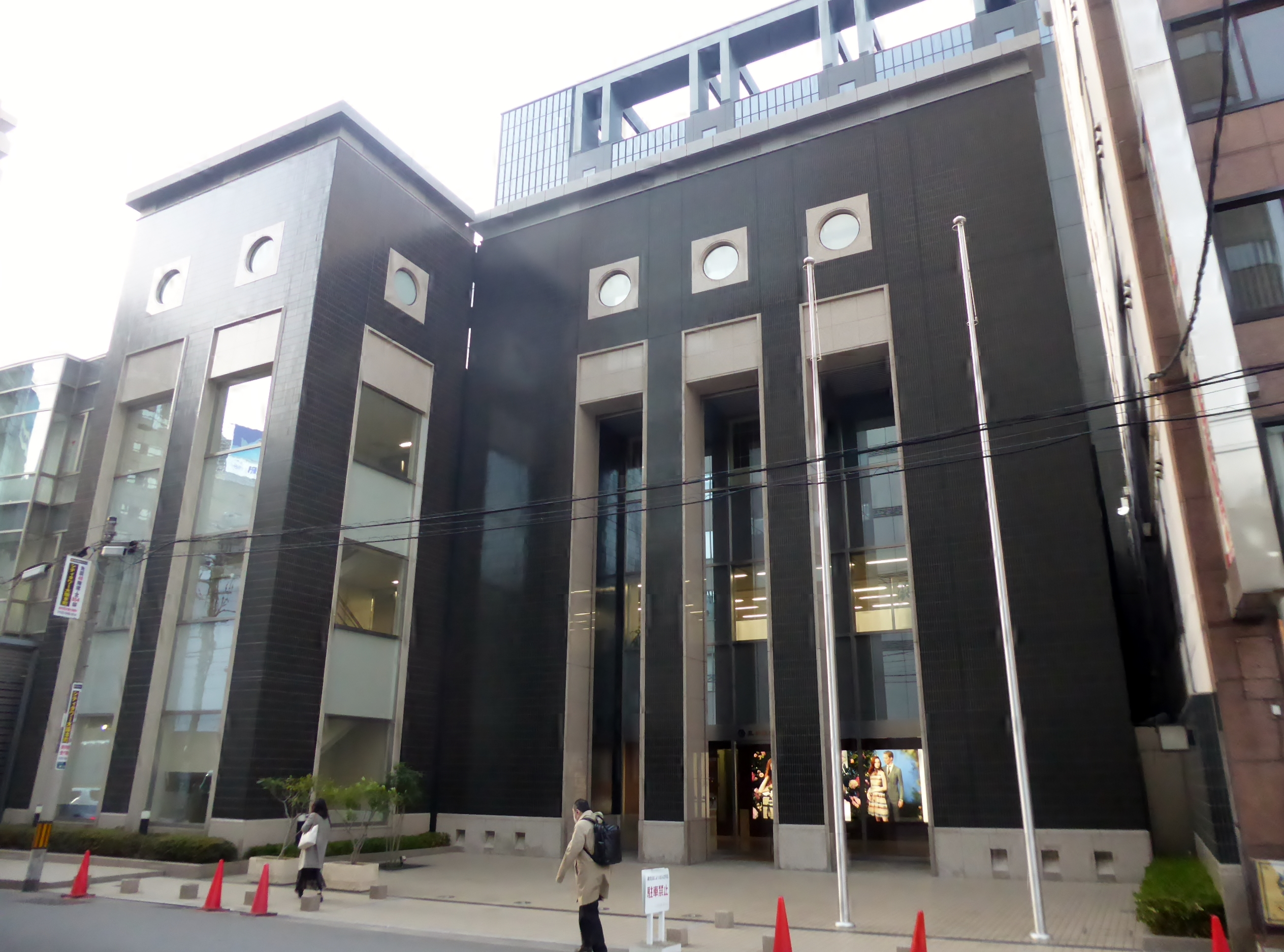 三共生興株式会社本社を撮影。